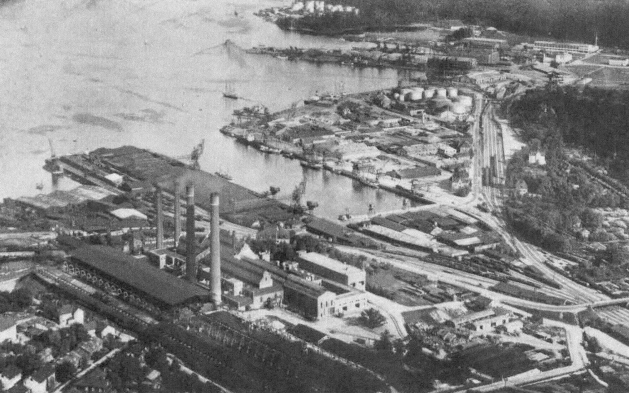 Vy över Värtahamnen och Frihamnen mot söder